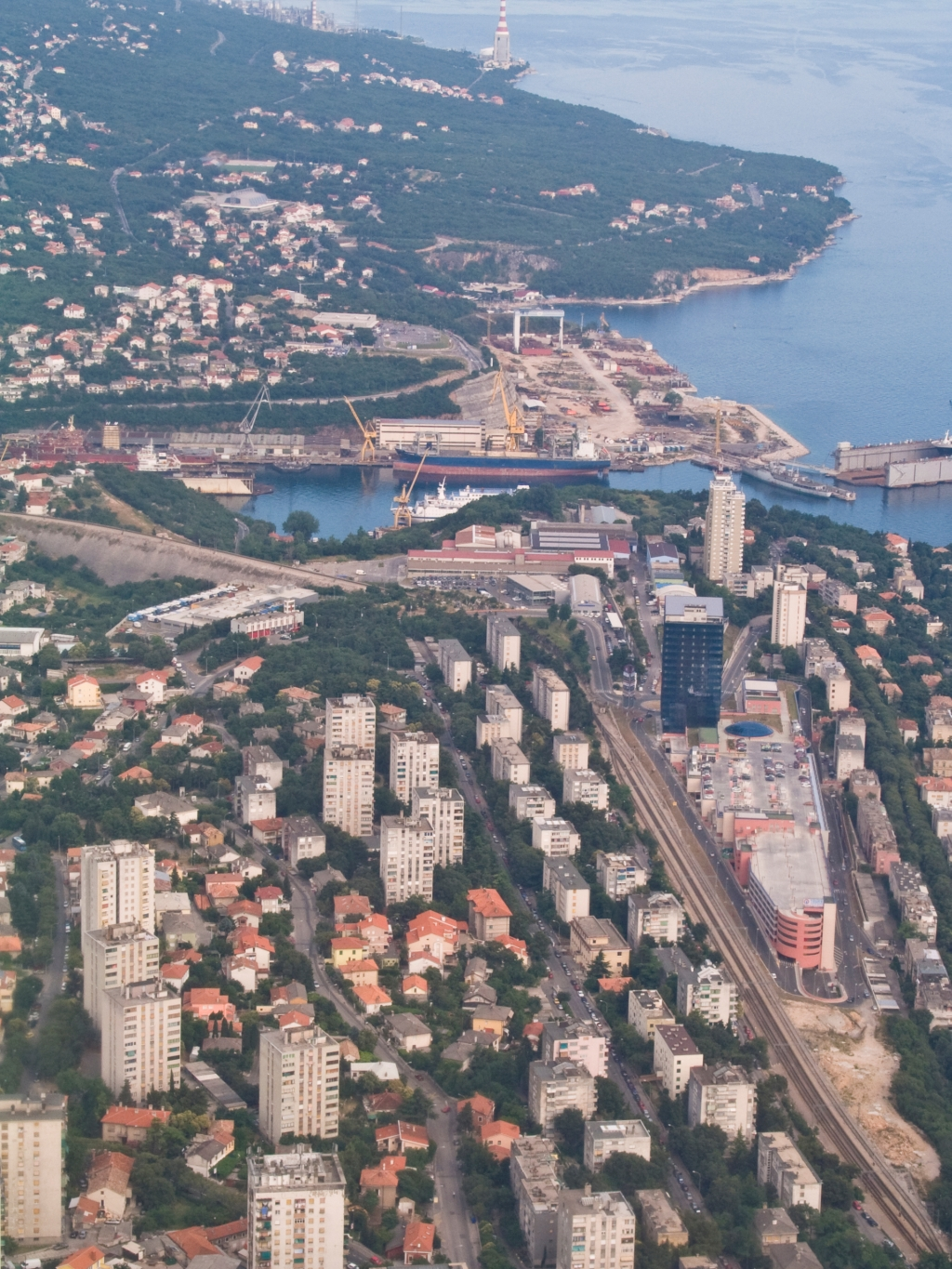 Pećine u Rijeci, brodogradilište Viktor Lenac, Kostrena